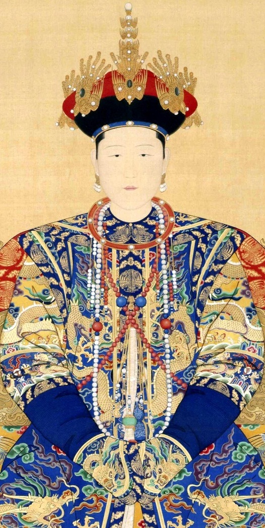 孝康章皇后, 康熙帝生母肖像